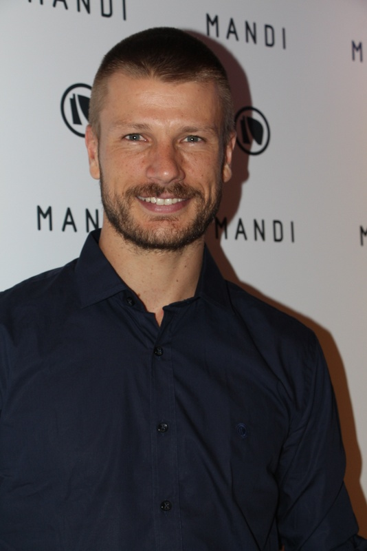 15 - Rodrigo Hilbert-003